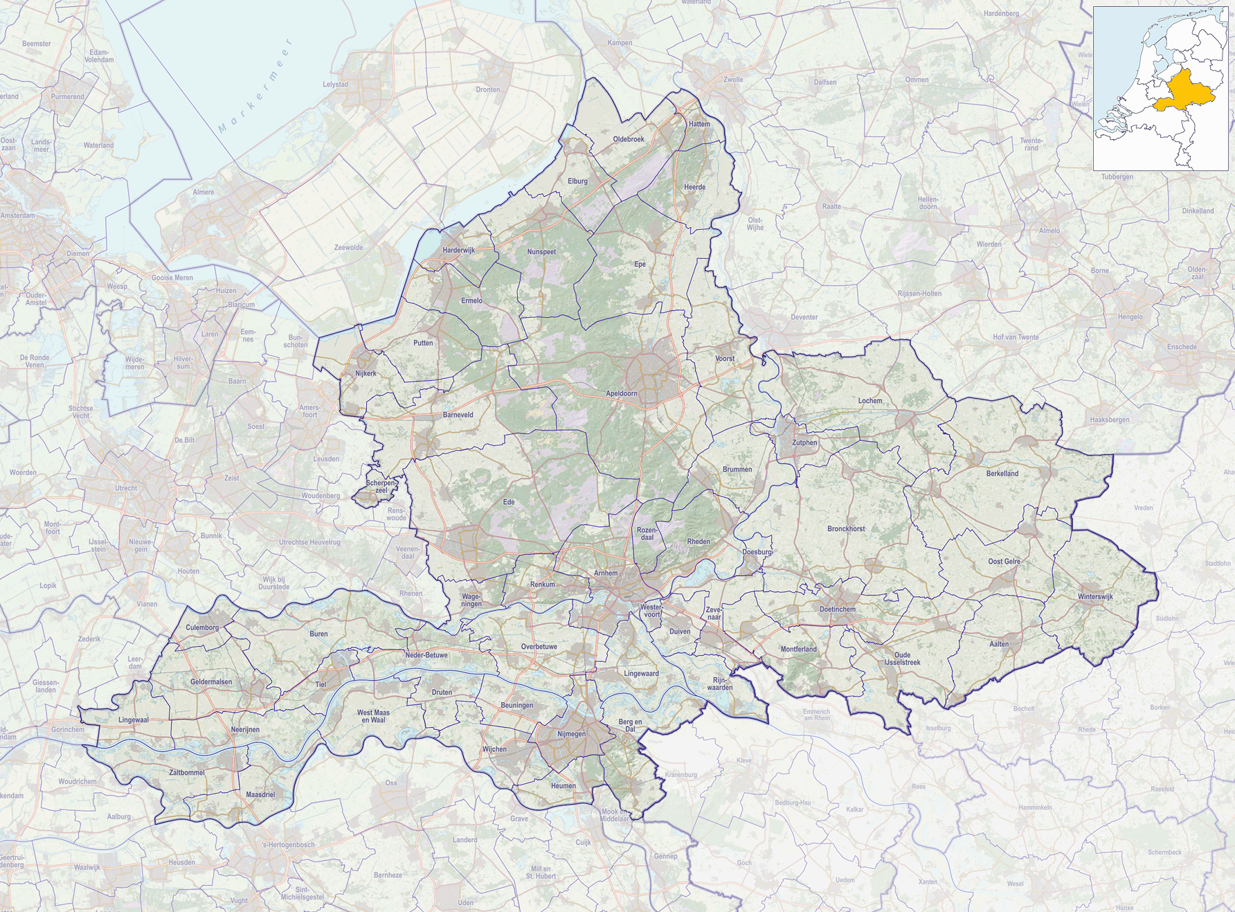 Positiekaartje van de provincie, variant "gemeentelabels"